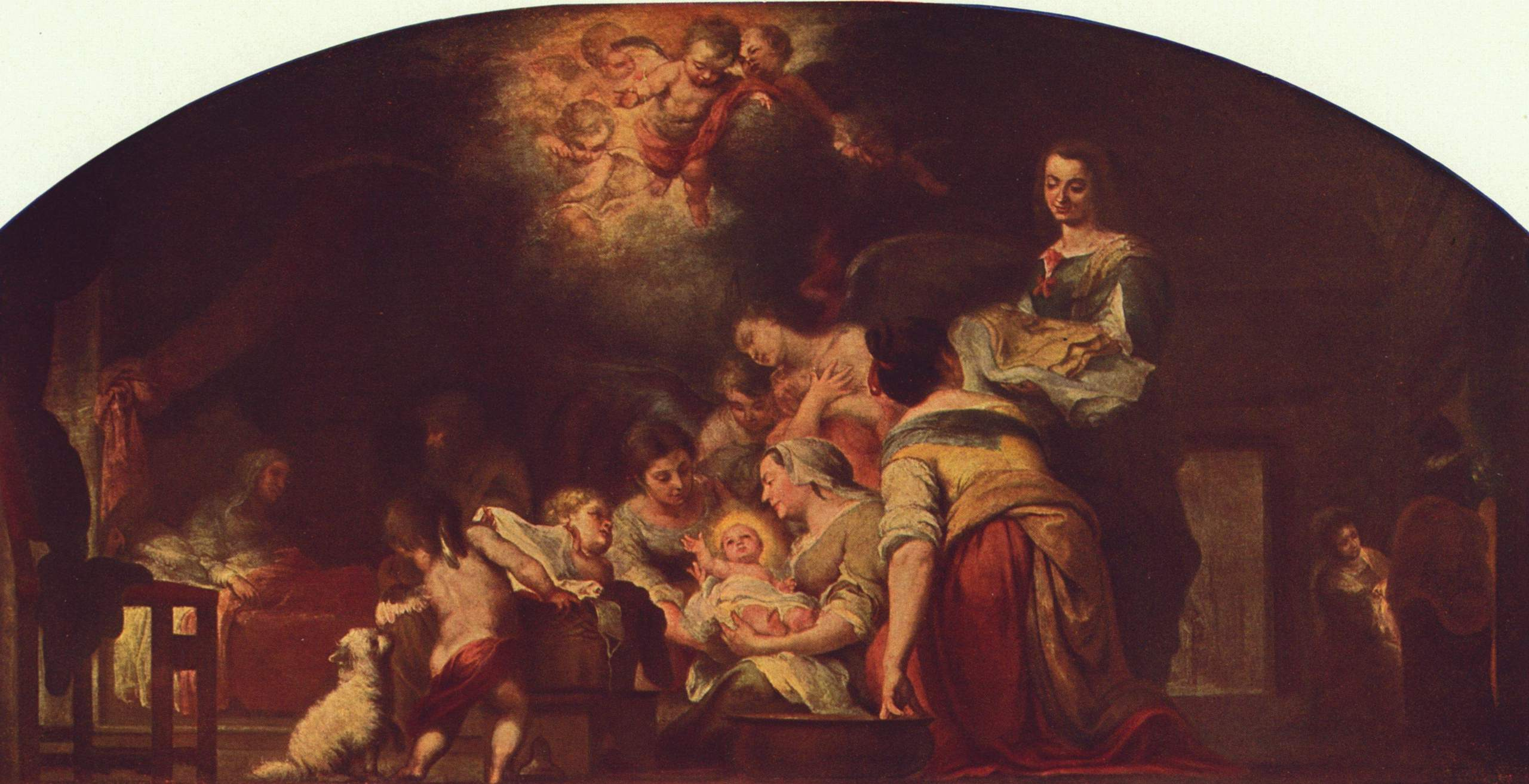 La Naissance de la Vierge , 1661